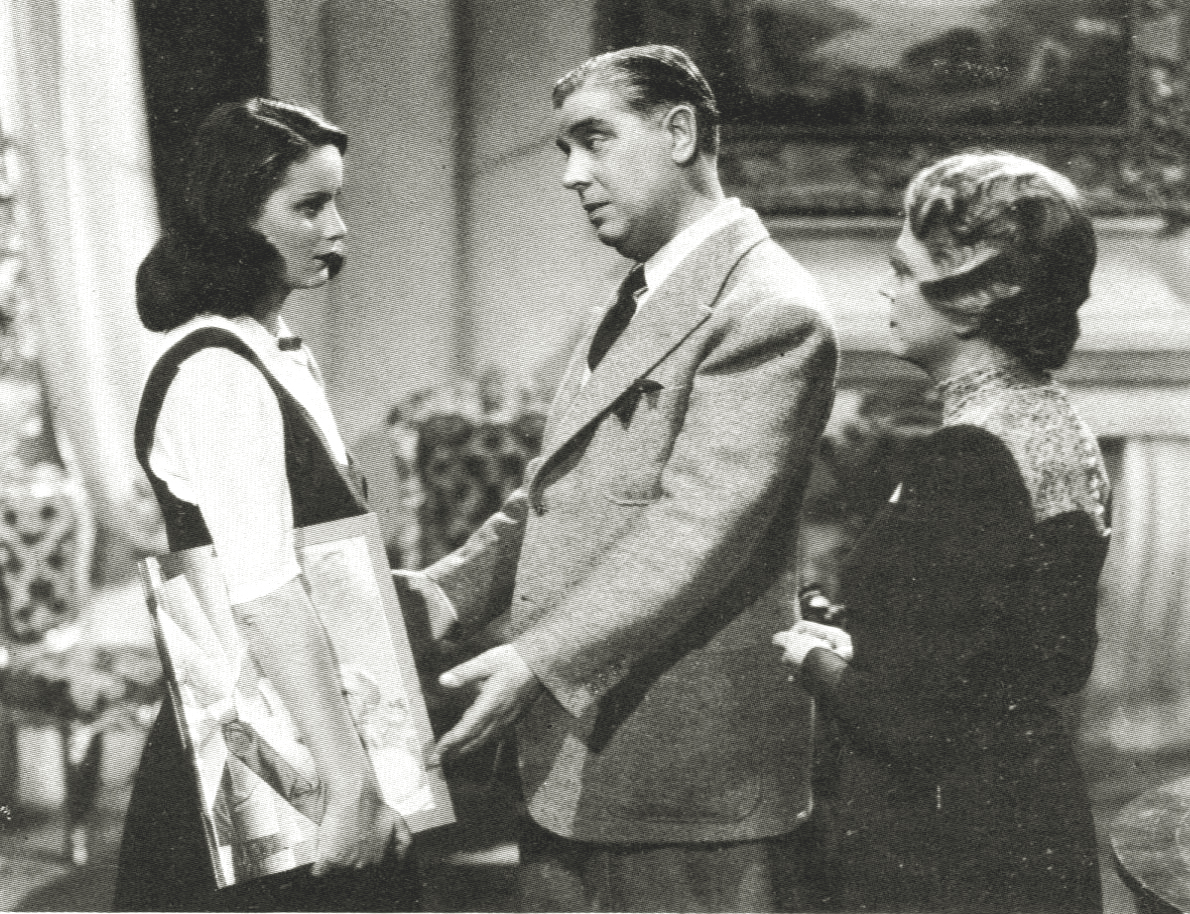 Alida Valli, Carlo Micheluzzi e Giuditta Rissone in "ore 9 lezione di chimica (Mattoli, 1941)